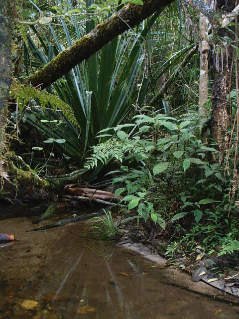 Vallee de Vakoana.